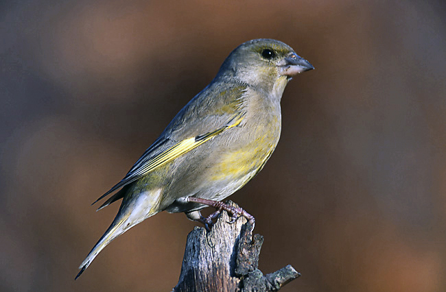 Carduelis chloris